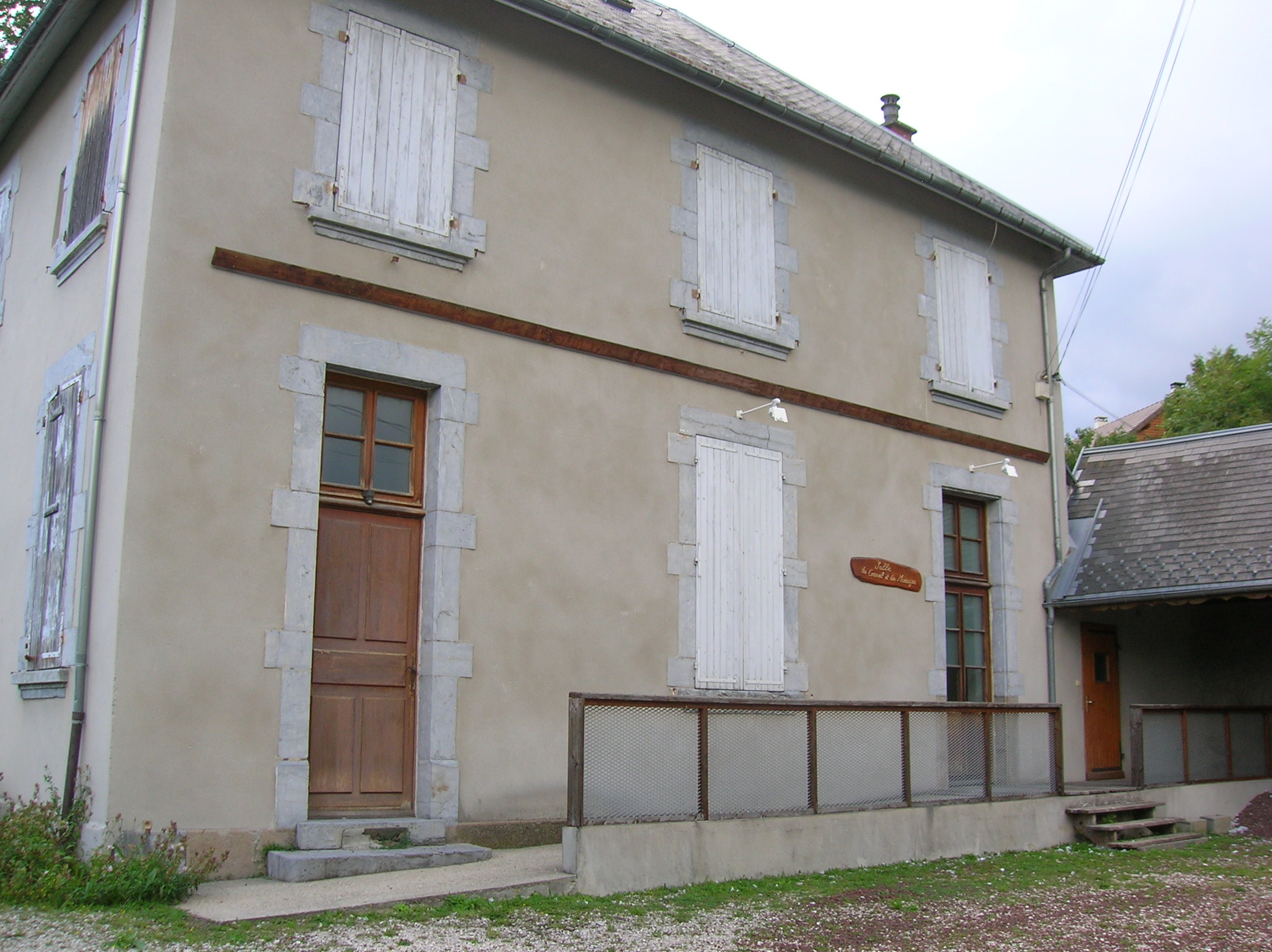 salle du Conseil et des mariages (à coté de la mairie), Saint-Théoffrey, Isère, Rhône-Alpes, France.